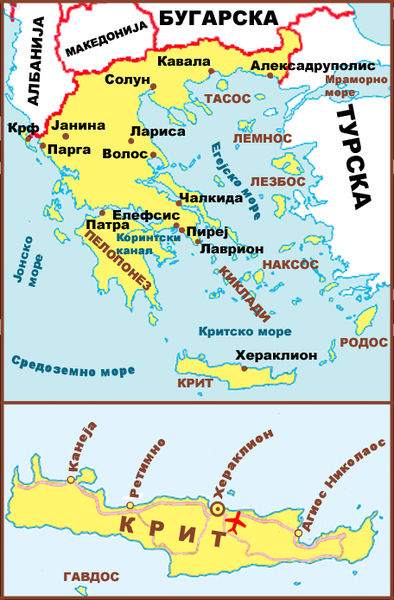 Аутор: Саша Костић Грчка мапа са Критом Licensing